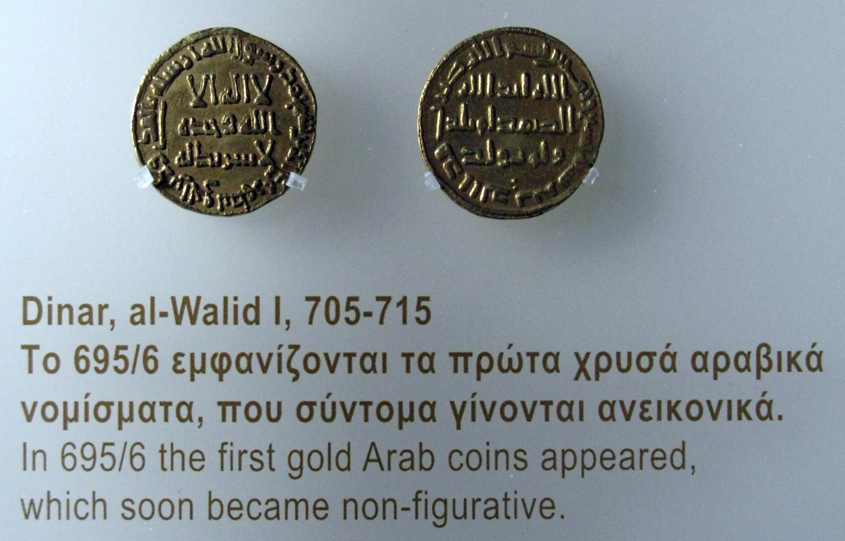 Numismatic Museum, Athens, Greece. --- Dinar, al-Walid I, 705-715. Το 695/6 εμφανίζονται τα πρώτα χρυσά αραβικά νομίσματα, που σύντομα γίνονται ανεικονικά. Νομισματικό Μουσείο, Αθήνα.